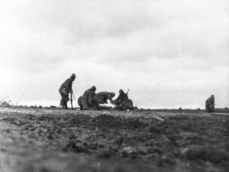 Die grosse Winterschlacht um Guadalajara Anfang März begann die grosse Offensive der nationalen Truppen auf Gudalajara, deren Hauptstoss auf der Strasse Madrid - Saragossa (Carretera de Aragon) geführt wurde. Die ausserordentlich schweren Kämpfe nahmen einen wechselnden Verlauf; das Kriegsglück, das sich im Anfang den Nationalen zuneigte, wandte sich später den Roten zu. Kälte, Hagelsturm, aufgeweichter Boden und scharfe Winde erwiesen sich oft als schlimmere Gegner als das feindliche Feuer. Die Soldaten der ersten beiden freiwilligen Divisionen lagen fünf Tage lang in Schlamm und Dreck, ohne warmes Essen. Zum ersten Male im spanischen Bürgerkrieg wurden ausschließlich motorisierte Einheiten eingesetzt. Ein Verwundeter erfährt auf offenem Feld die erste Hilfe. Fot. H.G. von Studnitz